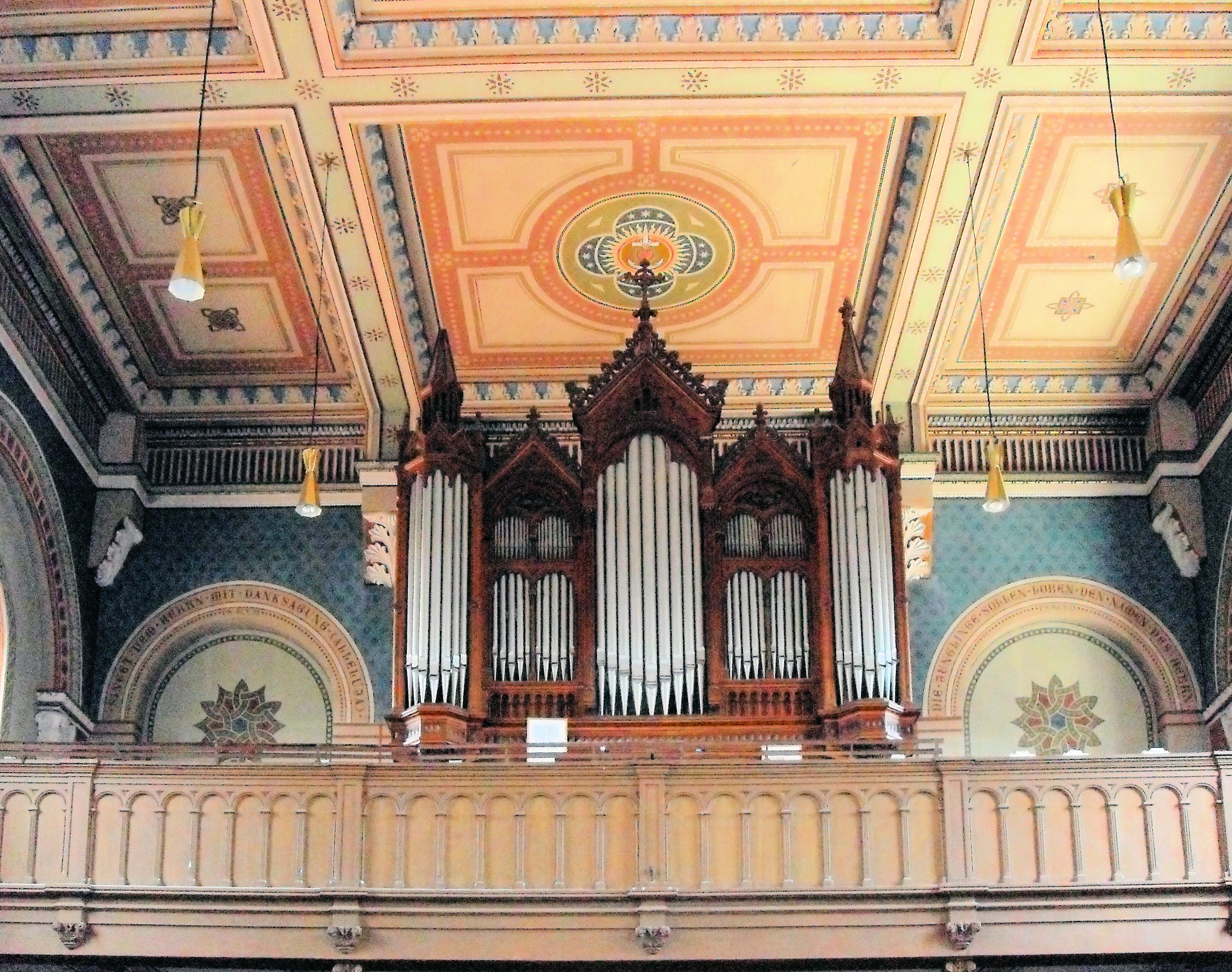 L'orgue par Martin Rinckenbach à partir de 1890 dans l'église Sainte-Lucie à Niederhergheim